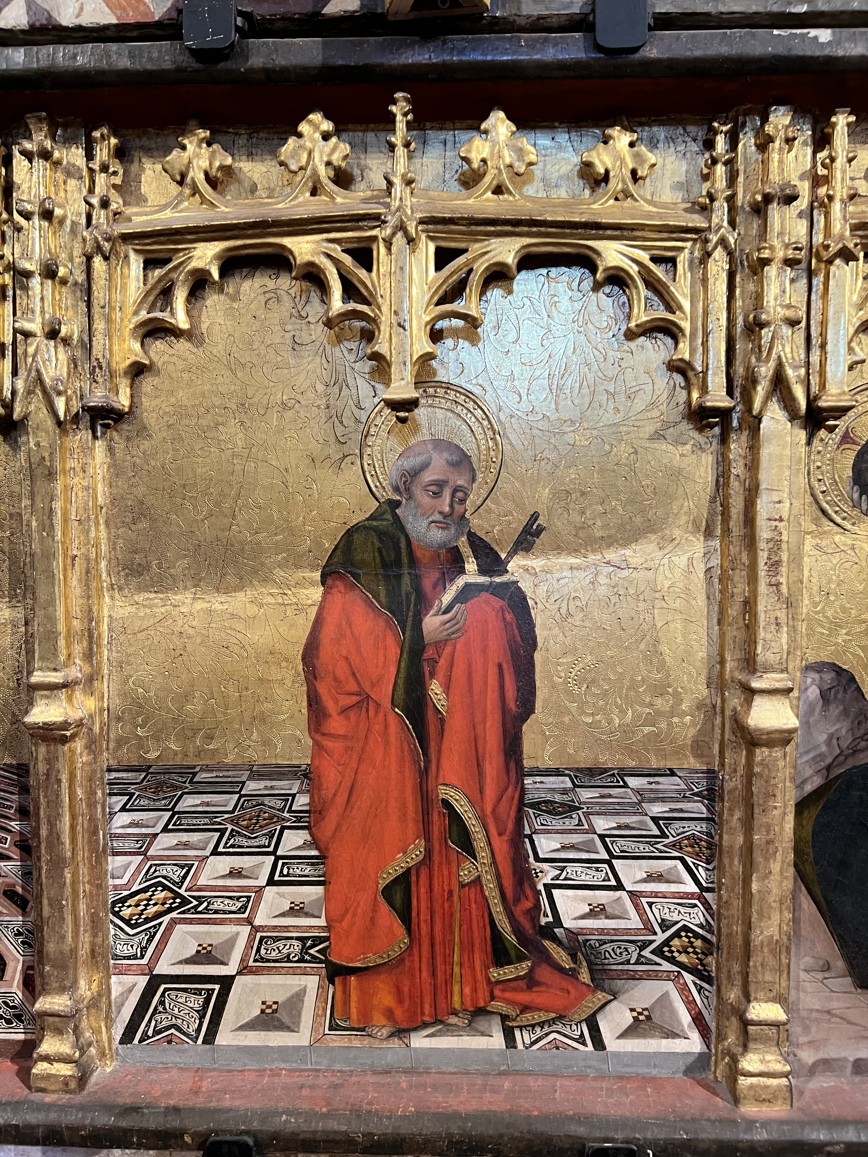 Pierre est représenté avec un livre et une clé entre les mains.